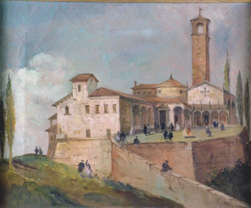 Veduta della Chiesa della Madonna del Monte, oggi area di Villa Aldini con figure che salgono sulla collina. Complesso con diversi edifici, campanile e portico. Bologna.